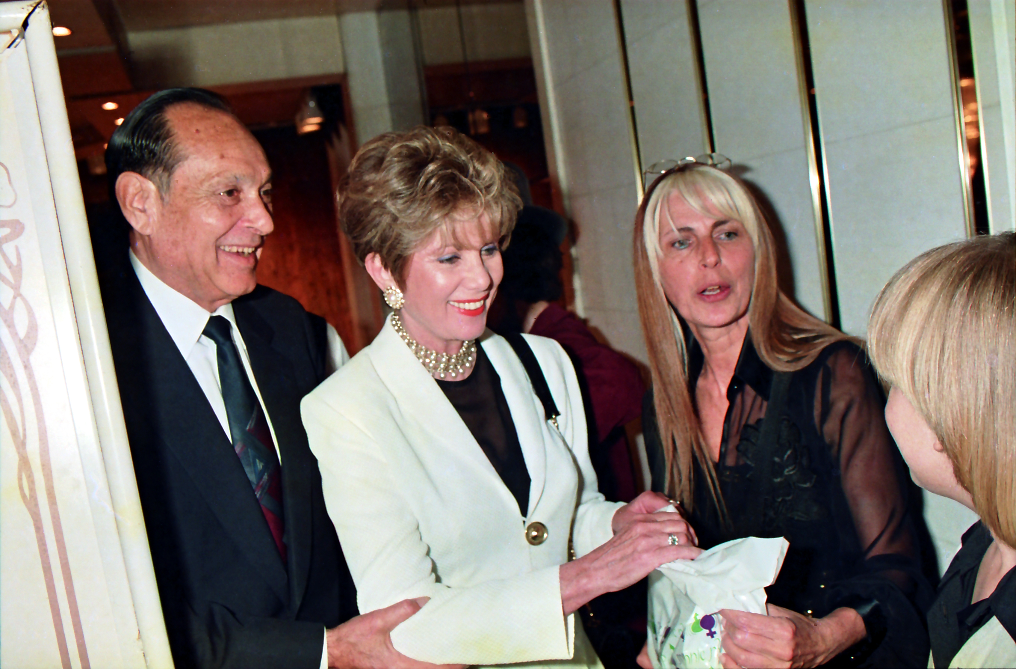 מיכל ויצחק מודעי (מימין זהבה שילון ויצו תל אביב)